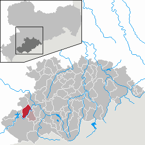 Zschorlau im Erzgebirgskreis, Sachsen